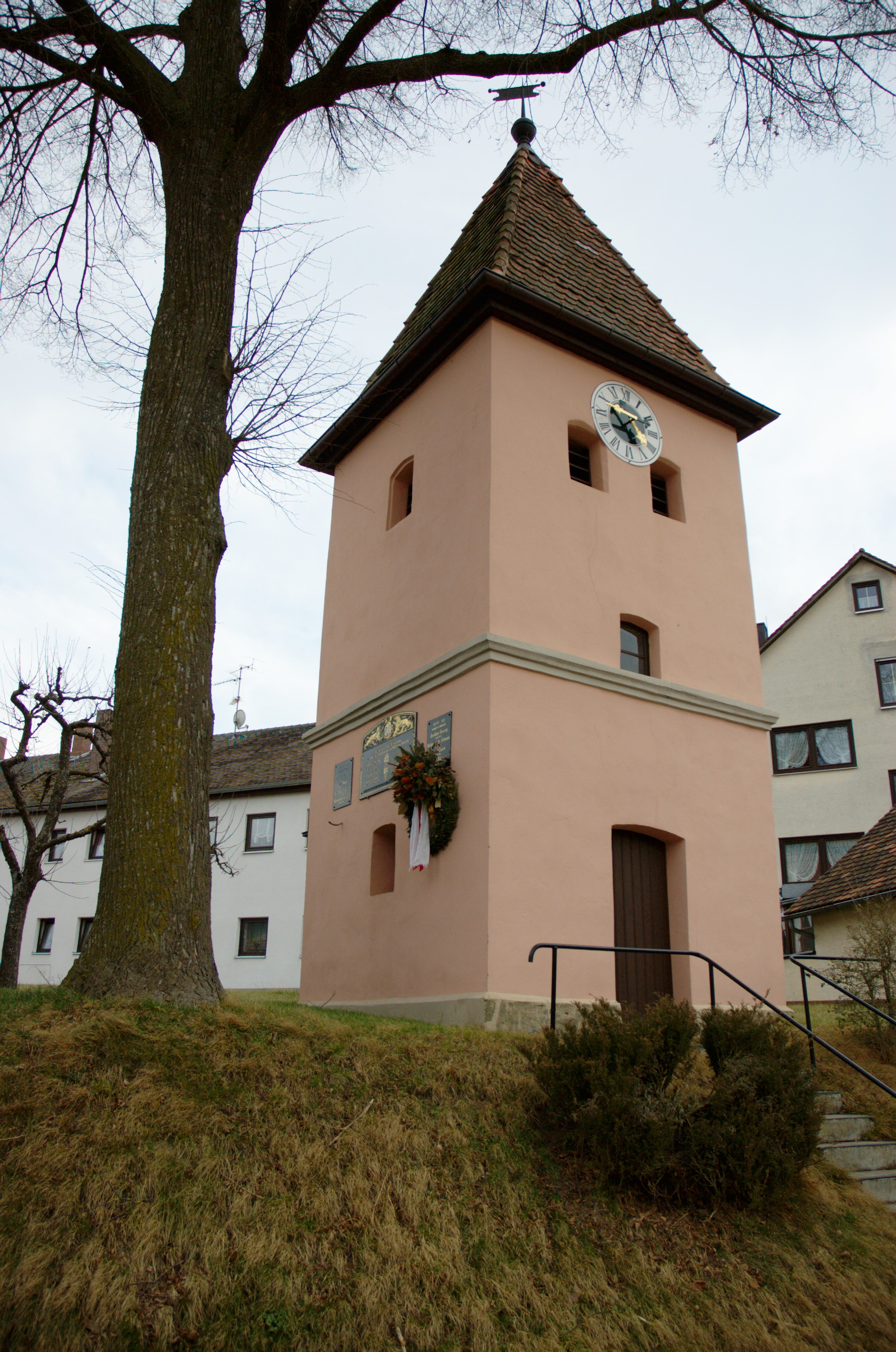 Gottmannsdorf, Kapelle